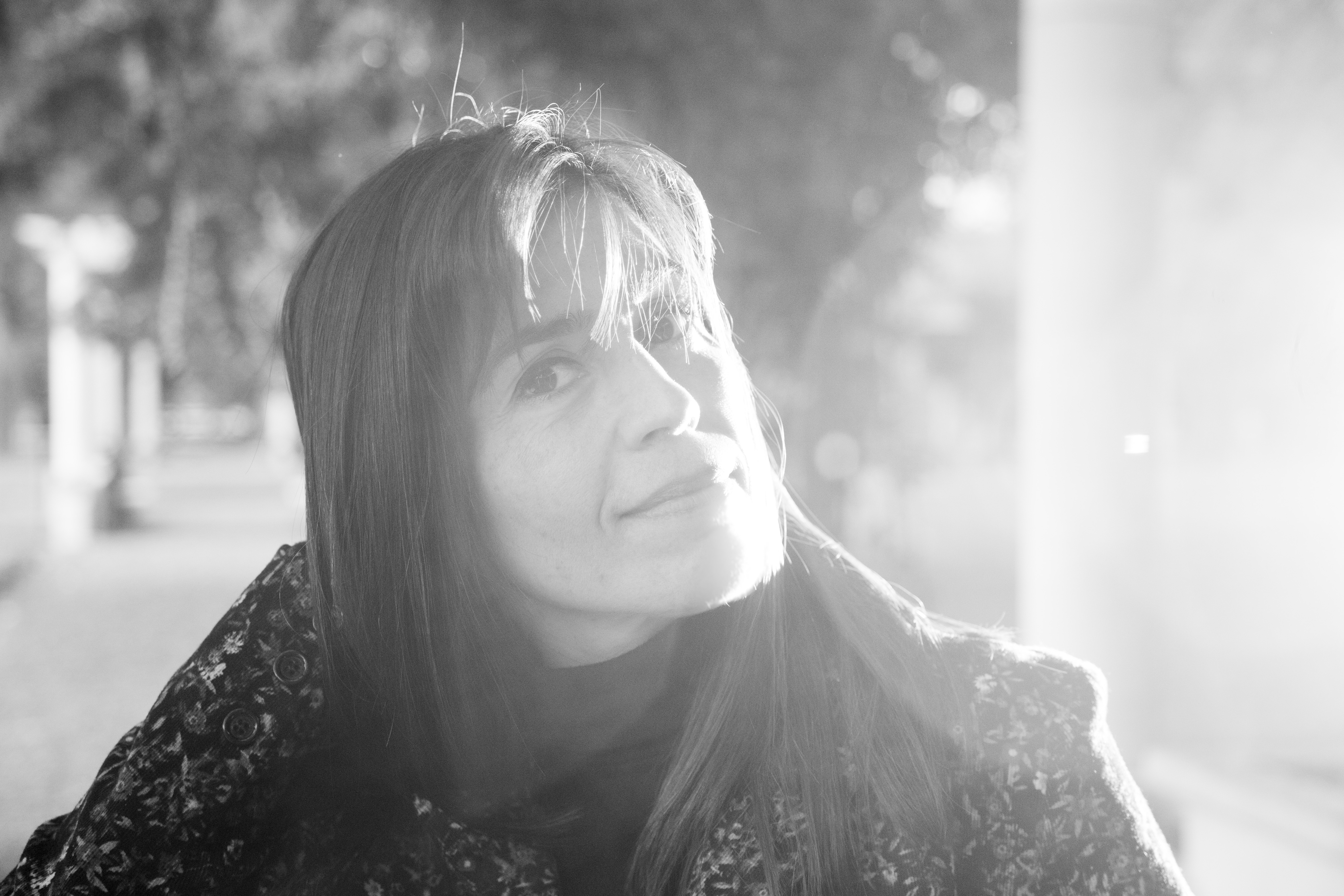 Romina Doval